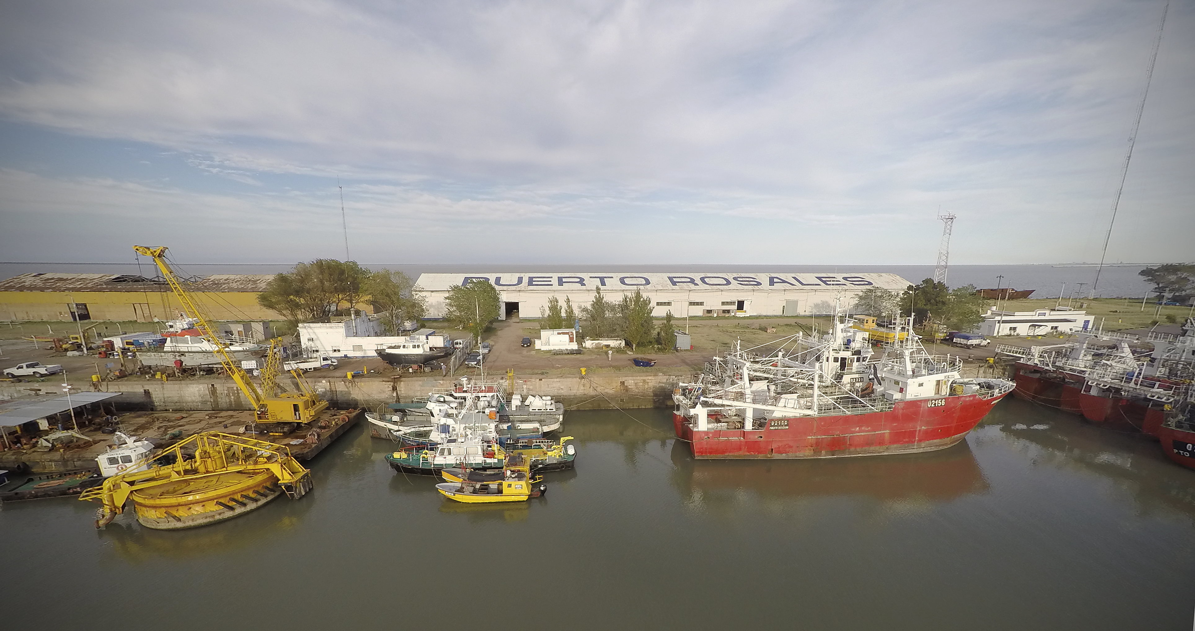 Buques amarrados al muelle de Puerto Rosales (Foto: Maurucio Clermont)